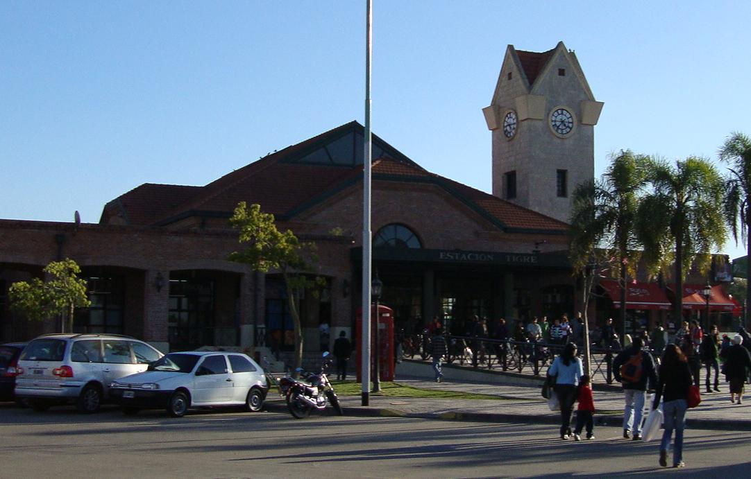 Vista del edificio de la nueva estación "Tigre" del Ferrocarril General Bartolomé Mitre.